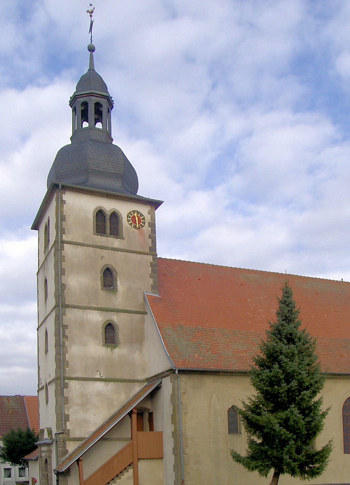 L'église luthérienne à Sarre-Union